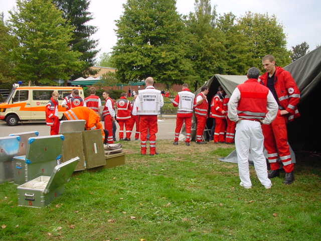 sangruppe